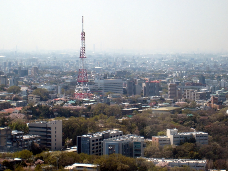 東山スカイタワー展望室から見た中京テレビ本社周辺地域